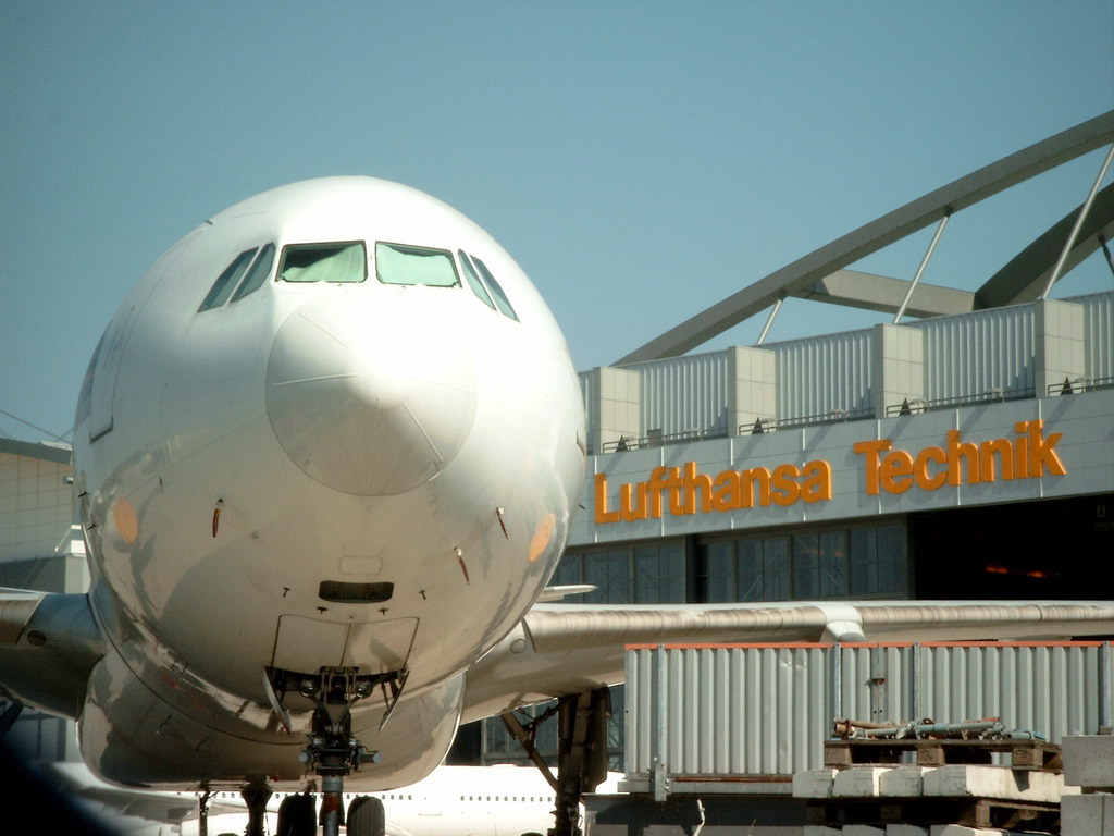 Ein Airbus A340 vor dem Gebäude der Lufthansa-Technik in Hamburg-Fuhlsbüttel.